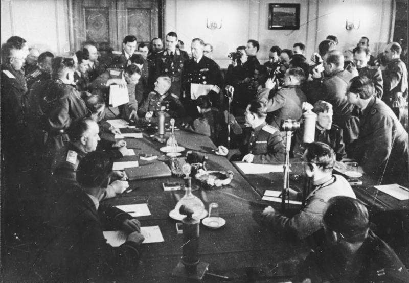 Berlin-Karlshorst, Kapitulation, Shukow, Keitel ADN-ZB/Archiv II.Weltkrieg 1939-1945 Die bedingungslose Kapitulation der faschistischen deutschen Wehrmacht wird am 8. Mai 1945 in Berlin-Karlhorst unterzeichnet. Links: Der Vertreter des Oberkommandos der Roten Armee, Marschall der Sowjetunion G. K. Shukow, am Tischende Generalfeldmarschall Wilhelm Keitel. J 0422/600/2 N Abgebildete Personen: Keitel, Wilhelm: Generalfeldmarschall, Ritterkreuz (RK), Heer, Deutschland (GND 118721577) Shukow, Georgi K.: Marschall, Verteidigungsminister, Sowjetunion